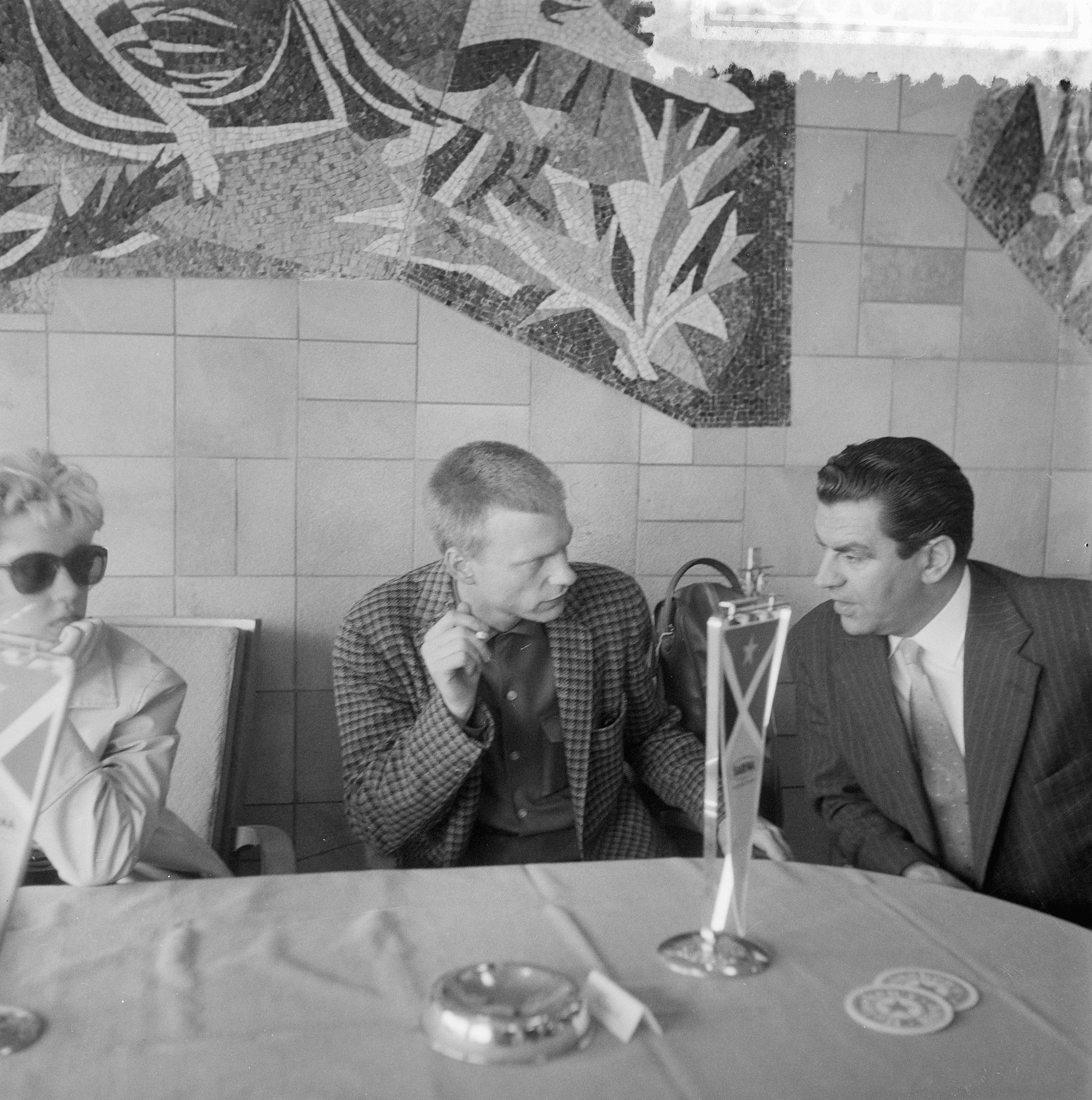 Collectie / Archief : Fotocollectie Anefo Reportage / Serie : [ onbekend ] Beschrijving : Aankomst Gerry Mulligan op Schiphol Datum : 18 mei 1957 Locatie : Noord-Holland, Schiphol Persoonsnaam : Mulligan, Gerry Fotograaf : Koch, Eric / Anefo Auteursrechthebbende : Nationaal Archief Materiaalsoort : Negatief (zwart/wit) Nummer archiefinventaris : bekijk toegang 2.24.01.03 Bestanddeelnummer : 908-6012